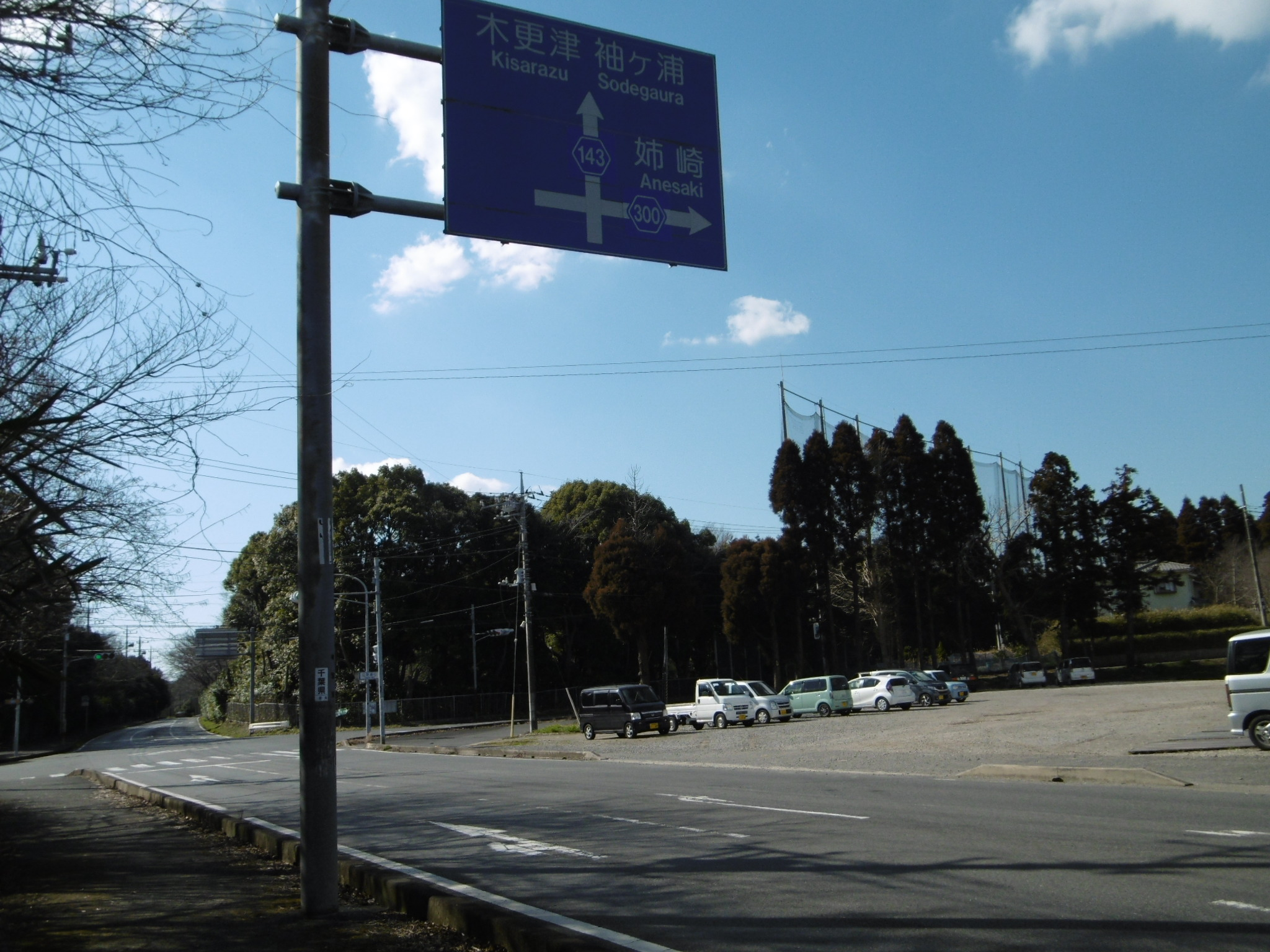 千葉県市原市上高根の信号交差点で接続する千葉県道143号南総昭和線(左奥)と千葉県道300号上高根北袖線(右方)。千葉県道300号はここが起点である。